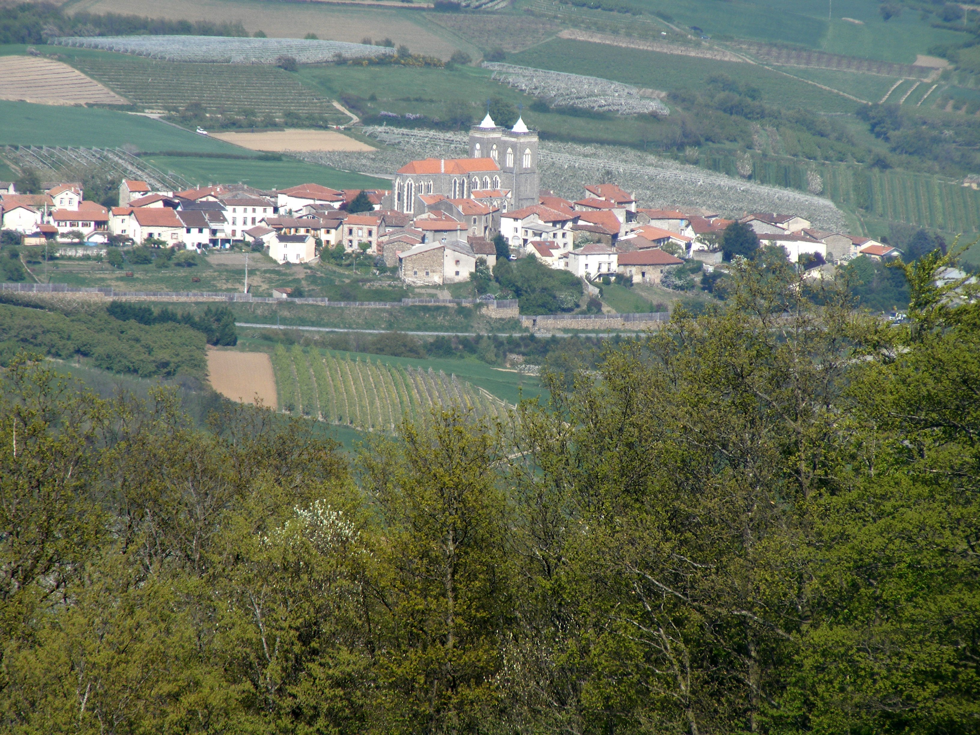 Vue générale depuis le sommet du Châtelard : le village de Saint-Didier-sous-Riverie et les côteaux du Lyonnais